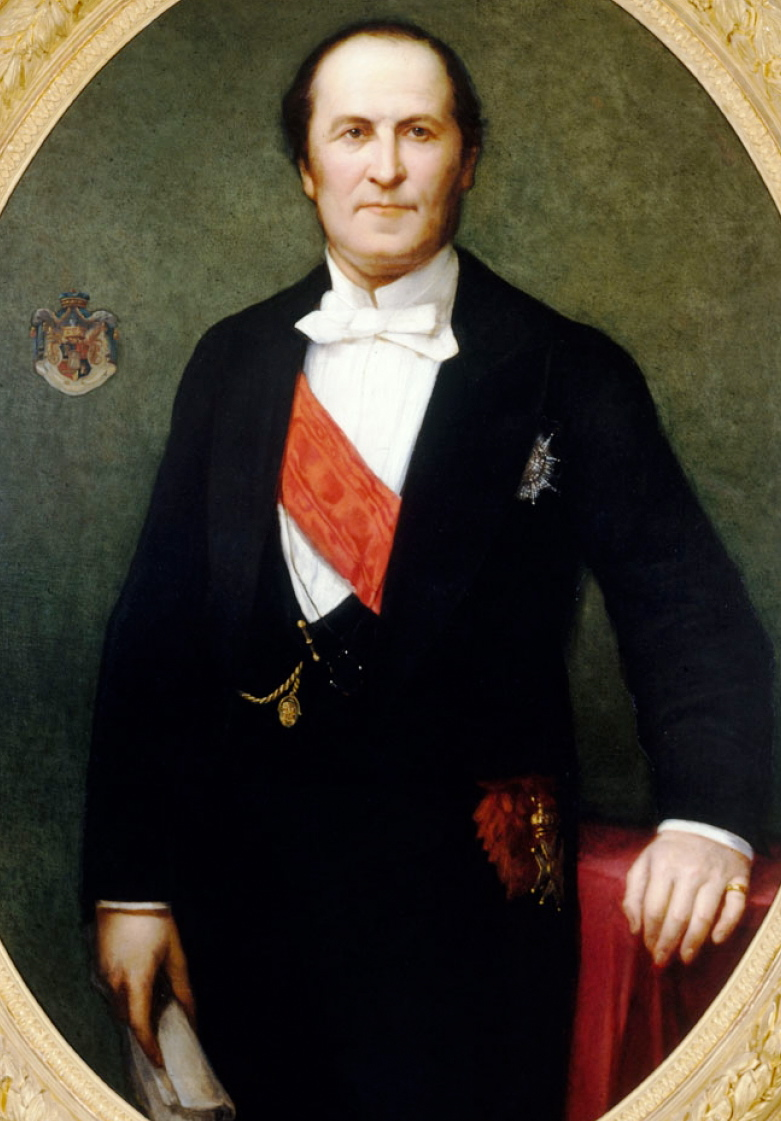 Baron Georges-Eugène Haussmann